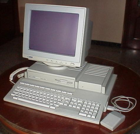 Atari Mega STE ecran monochrome